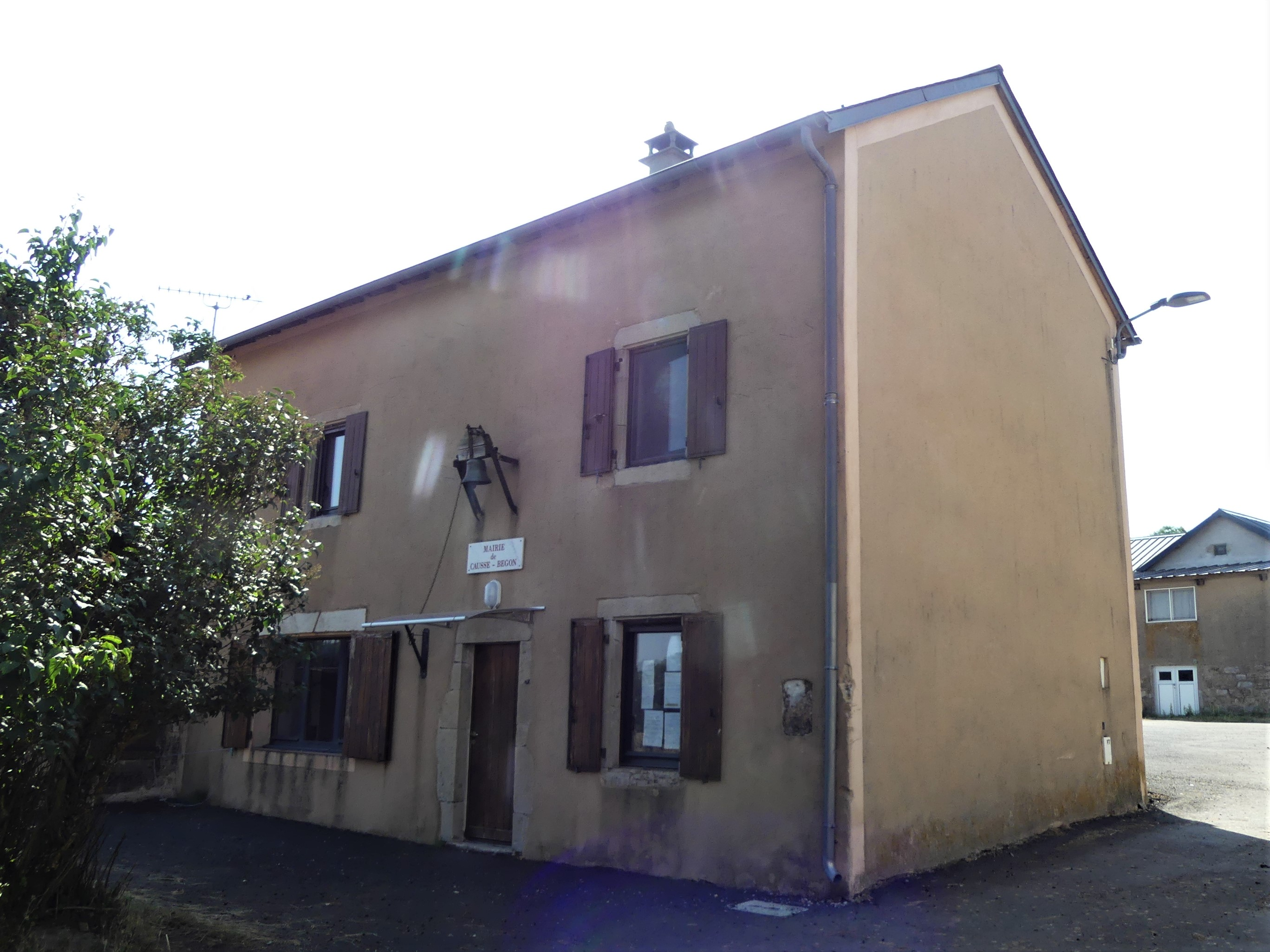 La mairie de Causse-Bégon, Gard, France.